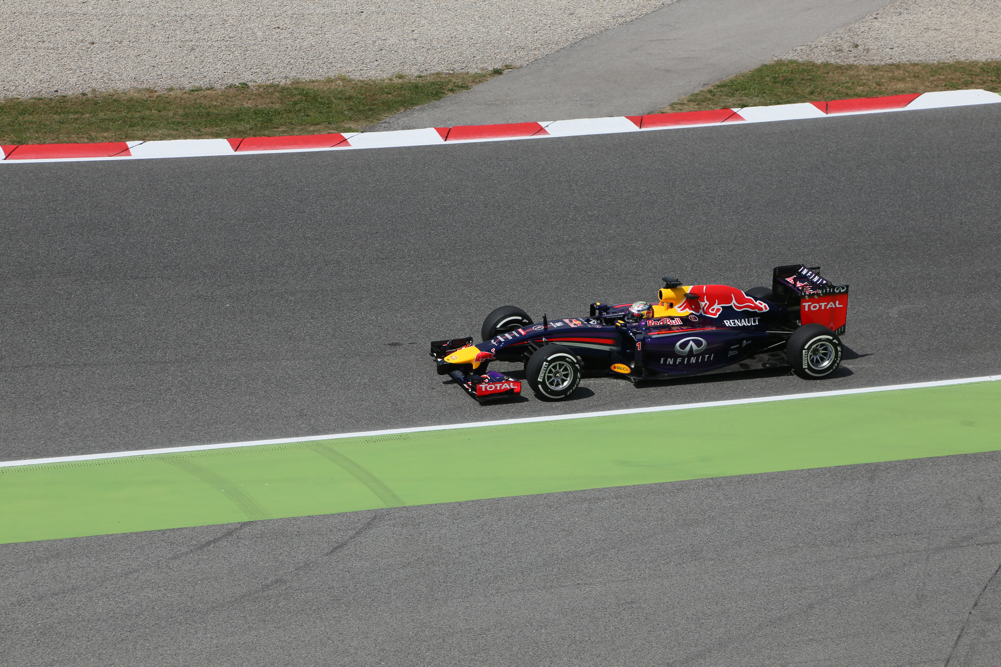 Sebastian Vettel